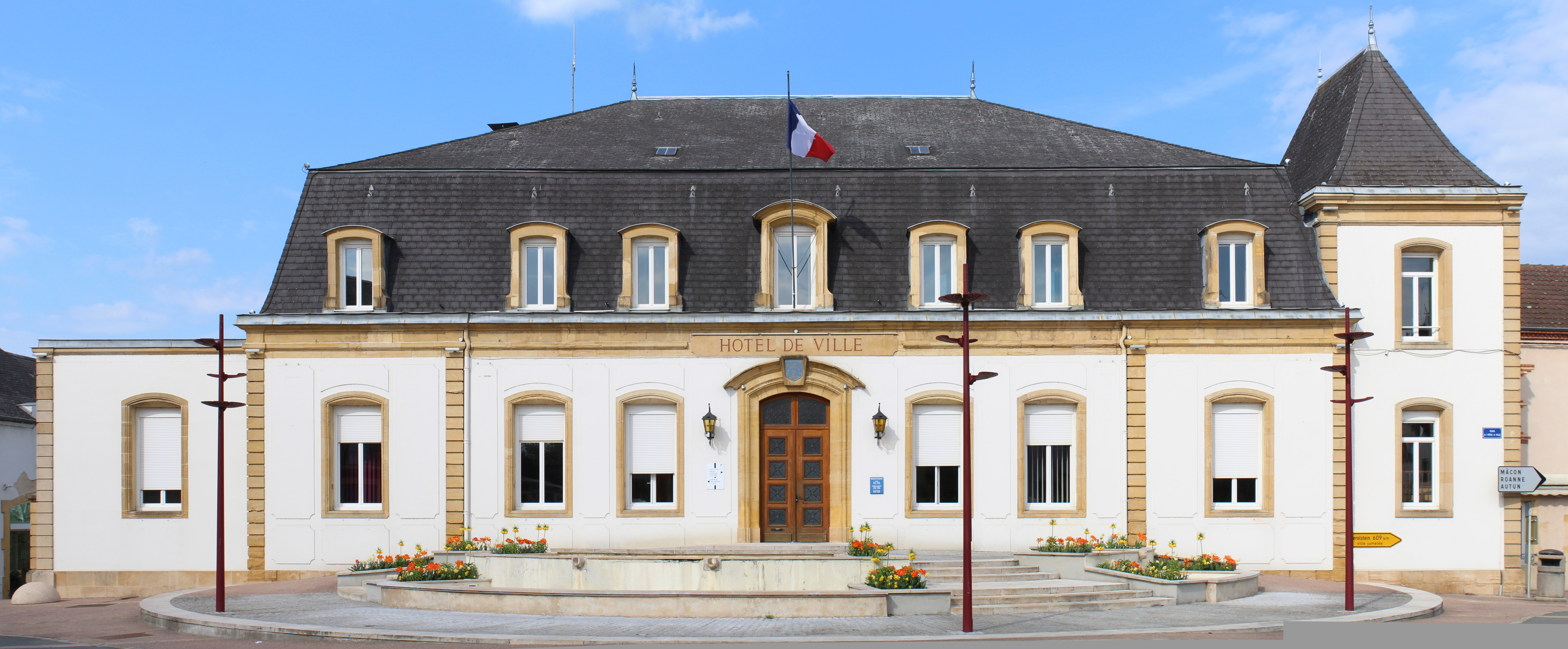 Hôtel de ville de Digoin.